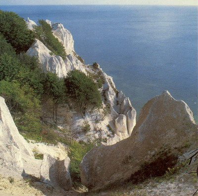 Møns Klint